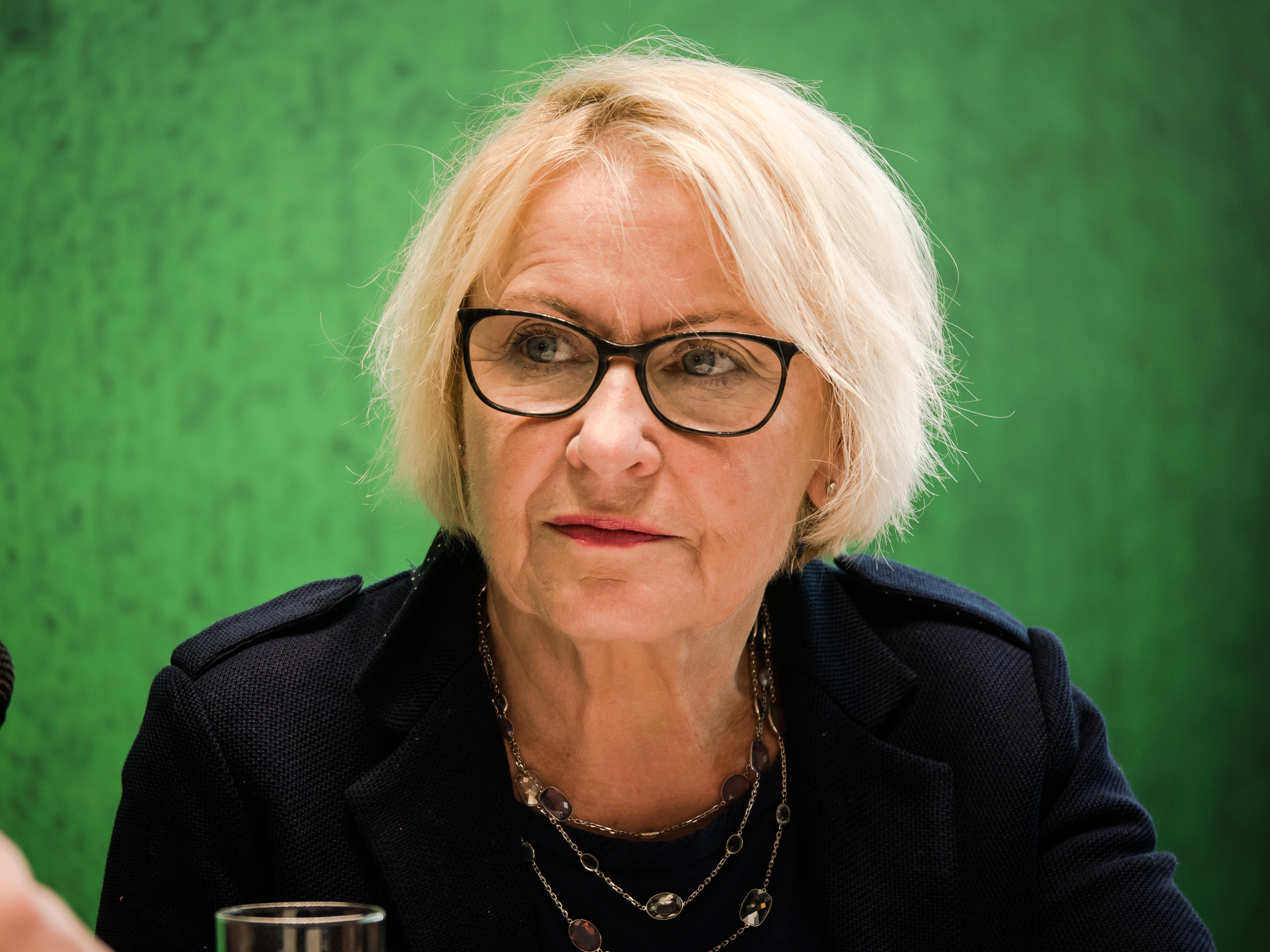 Die Journalistin Bascha Mika auf der Frankfurter Buchmesse 2017